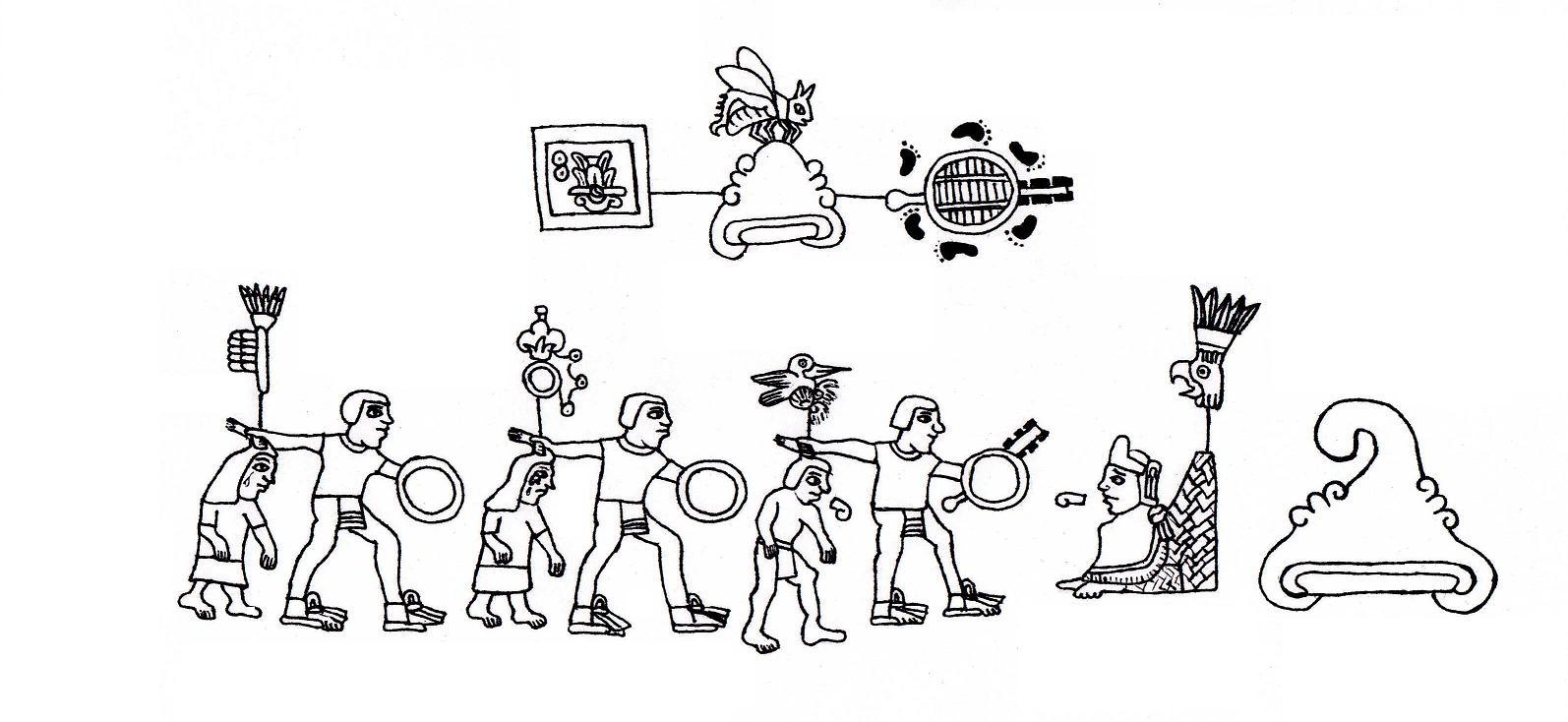 Lámina XX del Códice Boturini modificada para incluir a Tozpanxochitl, personaje que aparece en otros documentos que también fue capturada en la guerra de Chapoltepec (año 2-carrizo = 1299). Así aparece en la Tira de Tepechpan, en el Códice Ríos y en el Códice Azcatitlan.